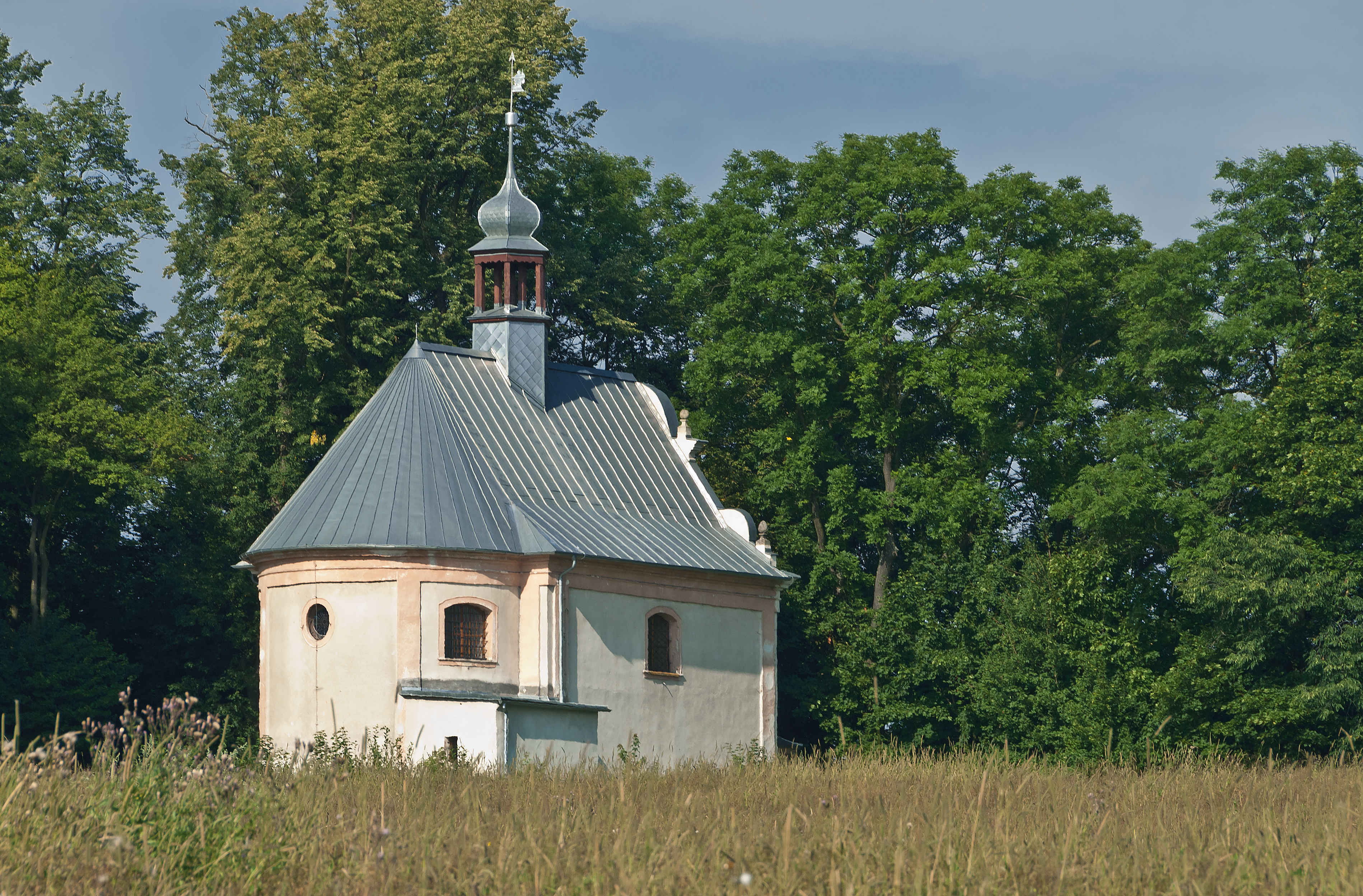 Bystrzyca Kłodzka, kaplica św. Floriana w parku miejskim, XVIII